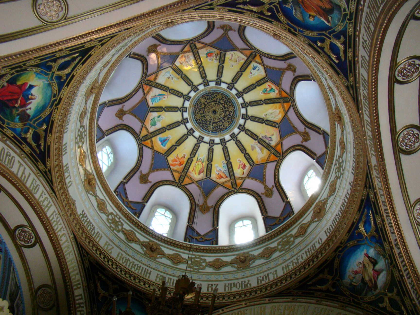 Свято-Казанский храм иконы Божией Матери в Кызылорде. Роспись главного купола.